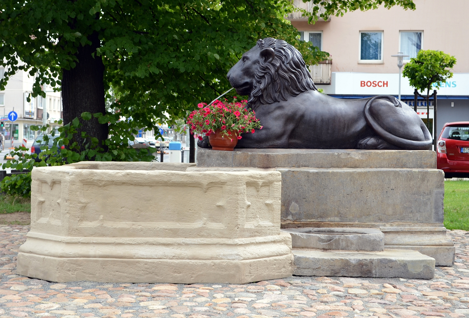 Braunschweig, Löwenbrunnen: Seitenansicht von Westen.